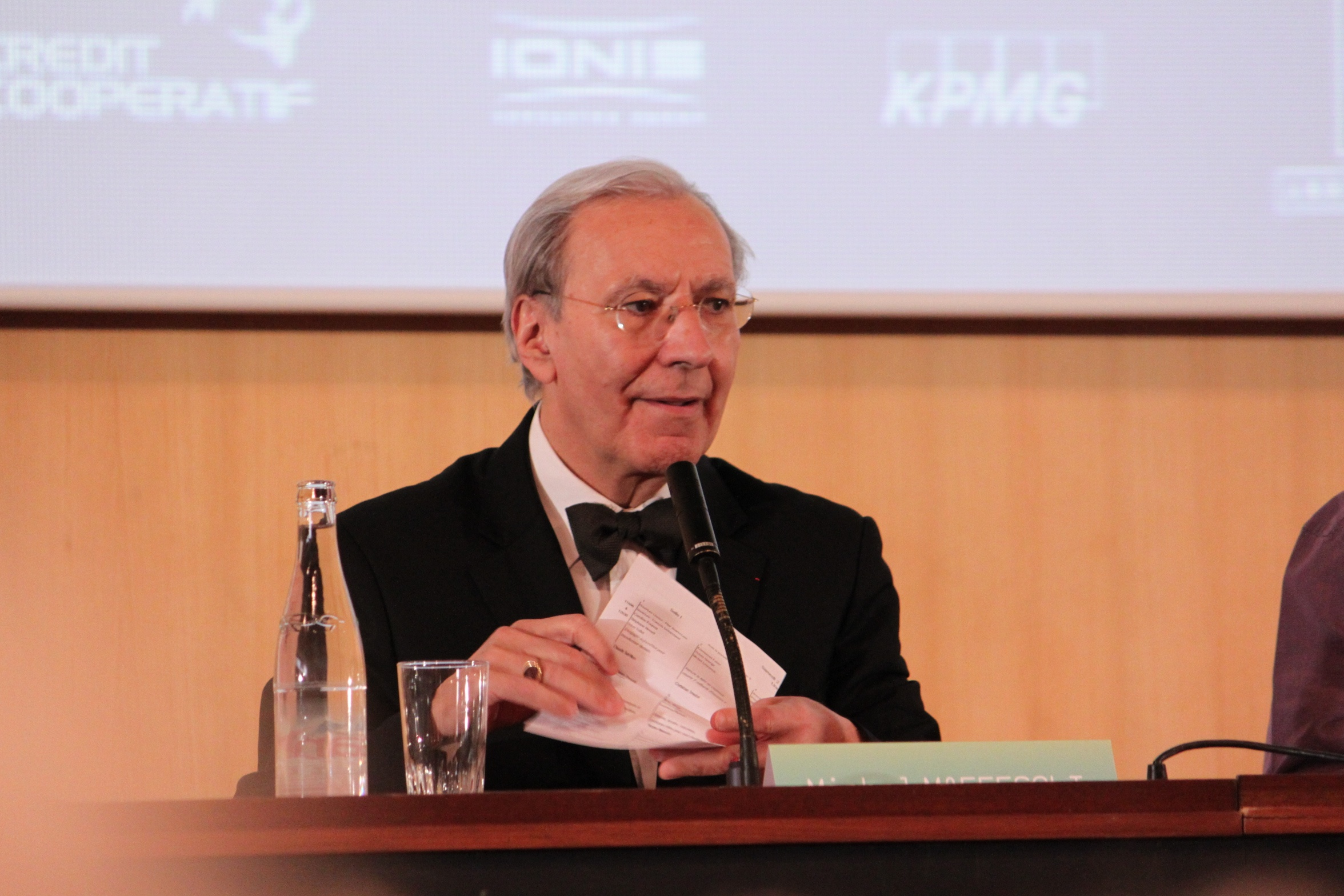 Michel Maffesoli à l'Université de la Terre, à Paris, le 2 avril 2011.